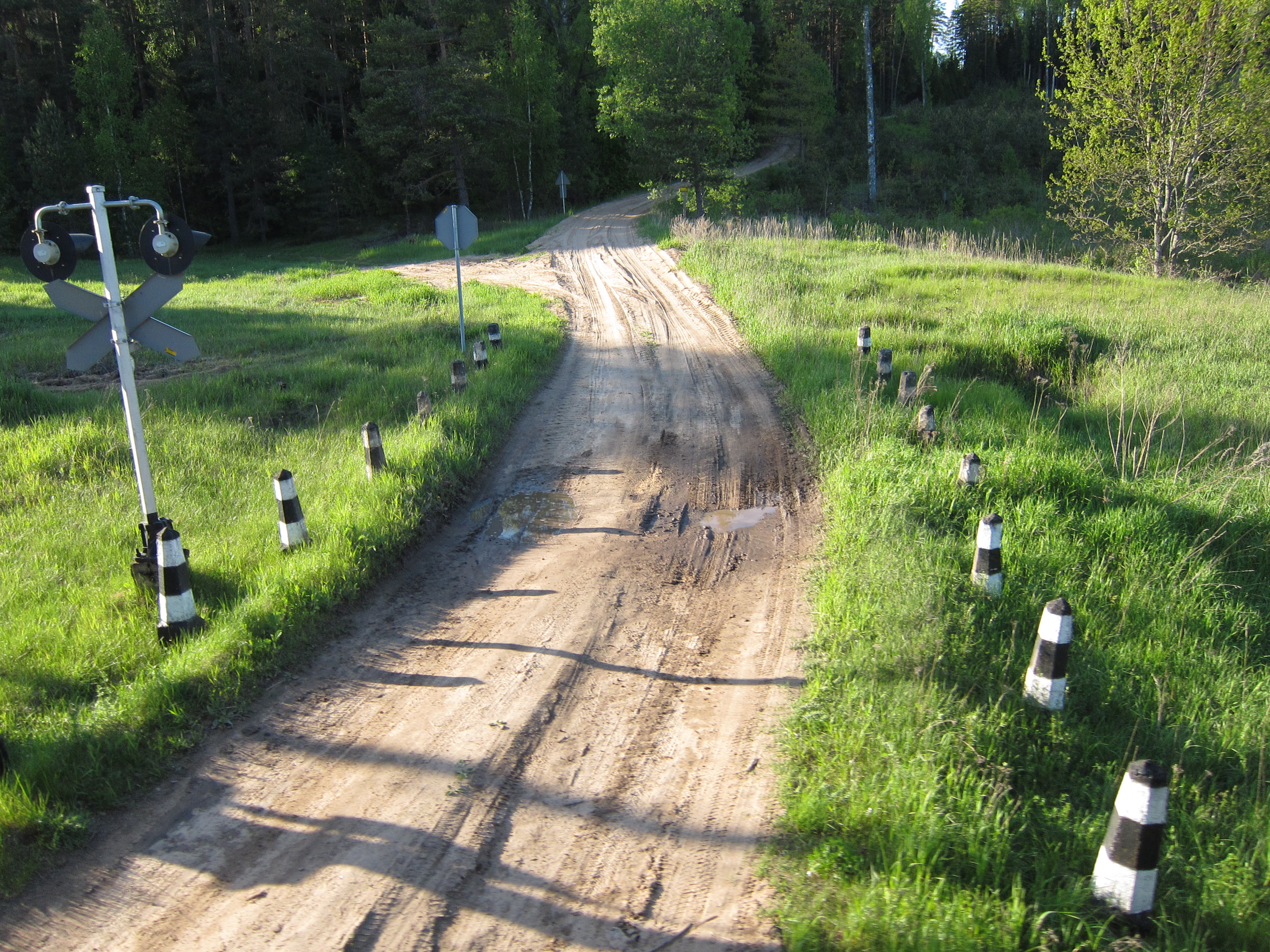 Dzelzceļa pārbrauktuve pie Spīganas stacijas (ceļš no Ķūģiem).